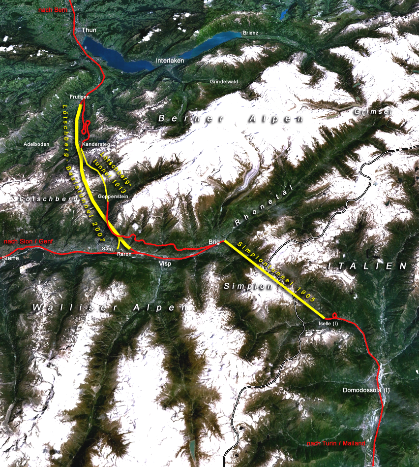 Situation der Lötschbergachse der Neuen Eisenbahn-Alpentransversale NEAT in der Schweiz mit dem neuen Lötschberg-Basistunnel und dem bestehenden Simplon-Basistunnel rot: bestehende Eisenbahnlinien, gelb: wichtige Tunnels, Jahreszahlen: Datum der Fertigstellung